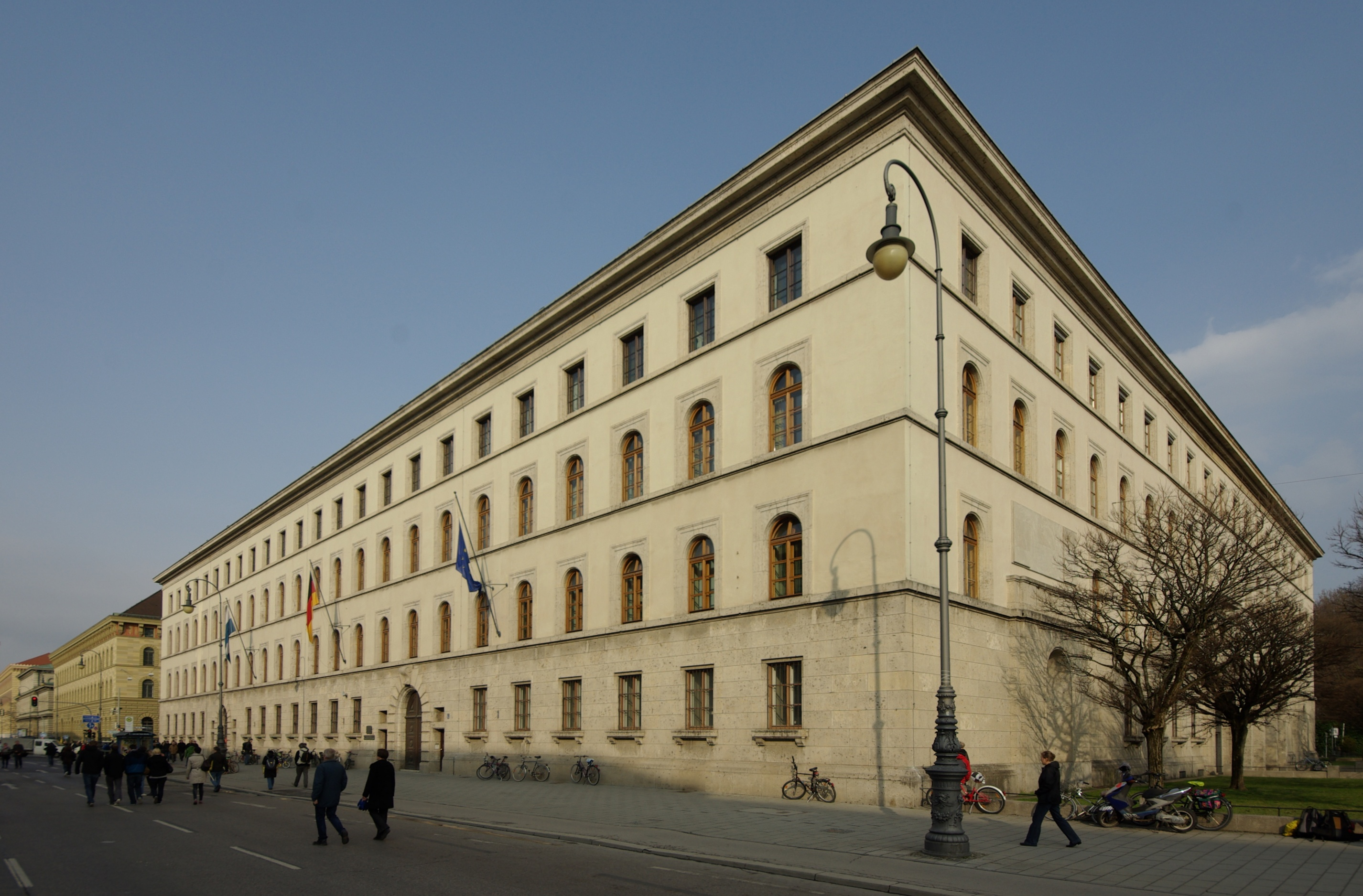 München, Bayerisches Staatsministerium für Ernährung, Landwirtschaft und Forsten (Ludwigstraße 2). In den 1930er Jahren wurden die einstigen vier Einzelgebäude abgerissen. Hier entstand 1938 bis 1940 das Zentralministerium, das das Finanz- und das Innenministerium sowie die Bayerische Staatskanzlei aufnehmen sollte und Amtssitz von NSDAP-Gauleiter und Reichsverteidigungskommissar Paul Giesler wurde. Seit 1984 erinnert im Innenhof eine Gedenktafel an die hier von Giesler am 28. und 29. April 1945 veranlasste Erschießung von Mitgliedern der Freiheitsaktion Bayern. 1946 bis 1958 diente der Bau als Generalkonsulat der USA, anschließend zog das Bayerische Landwirtschaftsministerium ein.